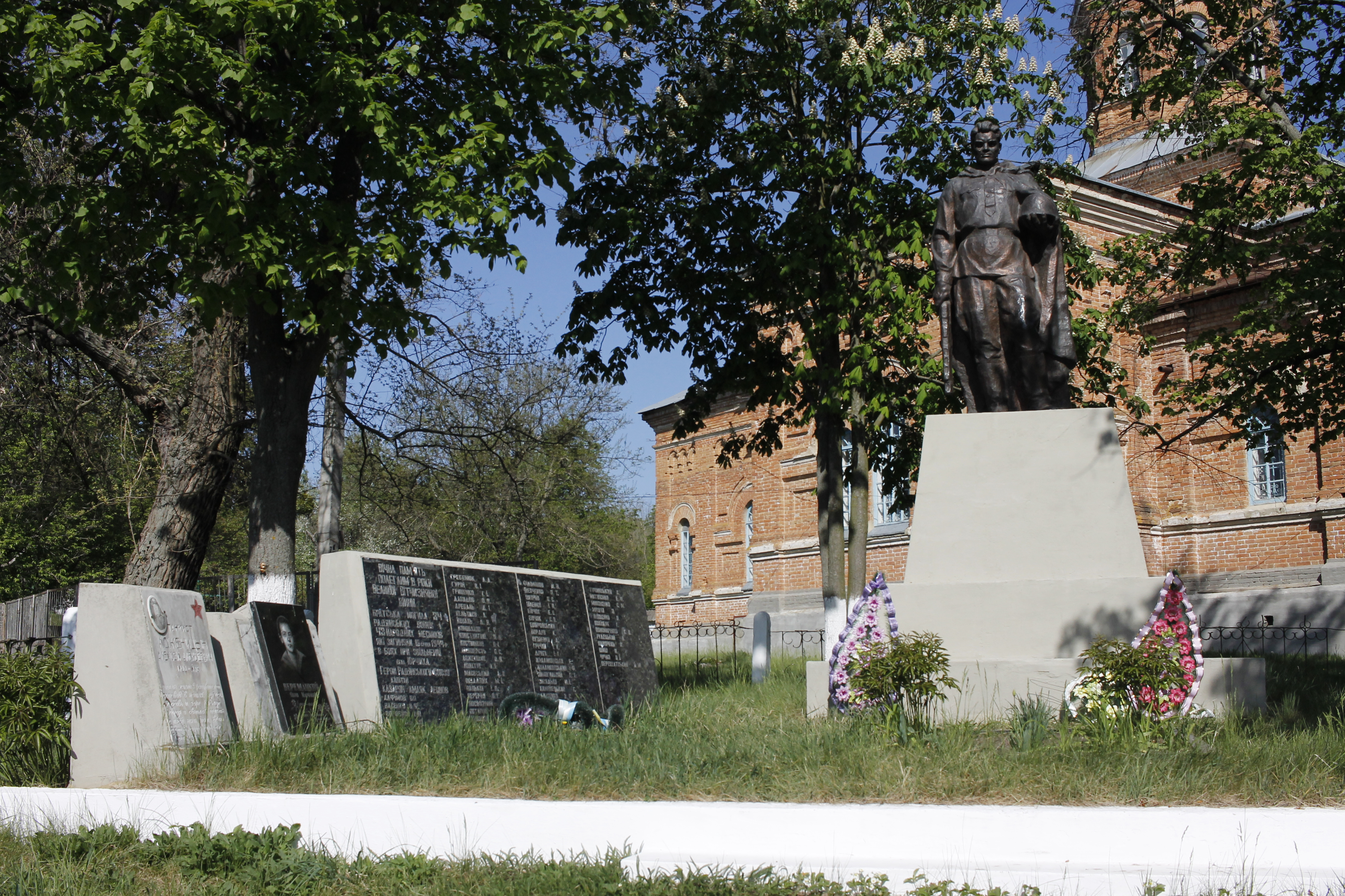 Братська могила радянських воїнів, Юрчиха, центр